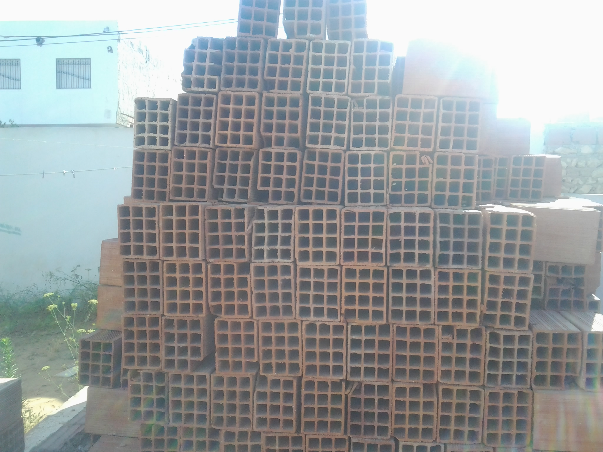 آجر يستعمل للبناء